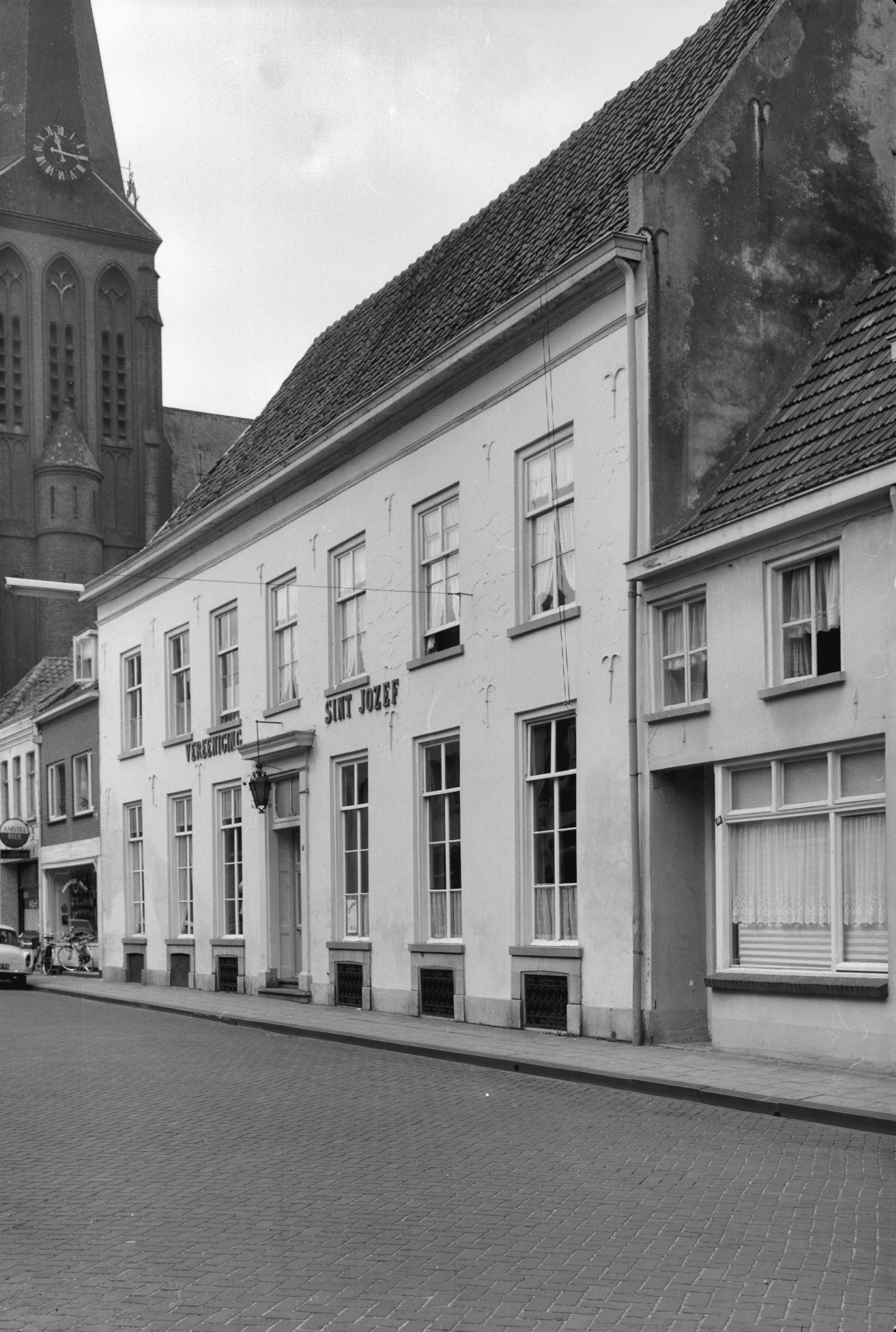 Woonhuizen M: Molenstr. 12, voorgevel